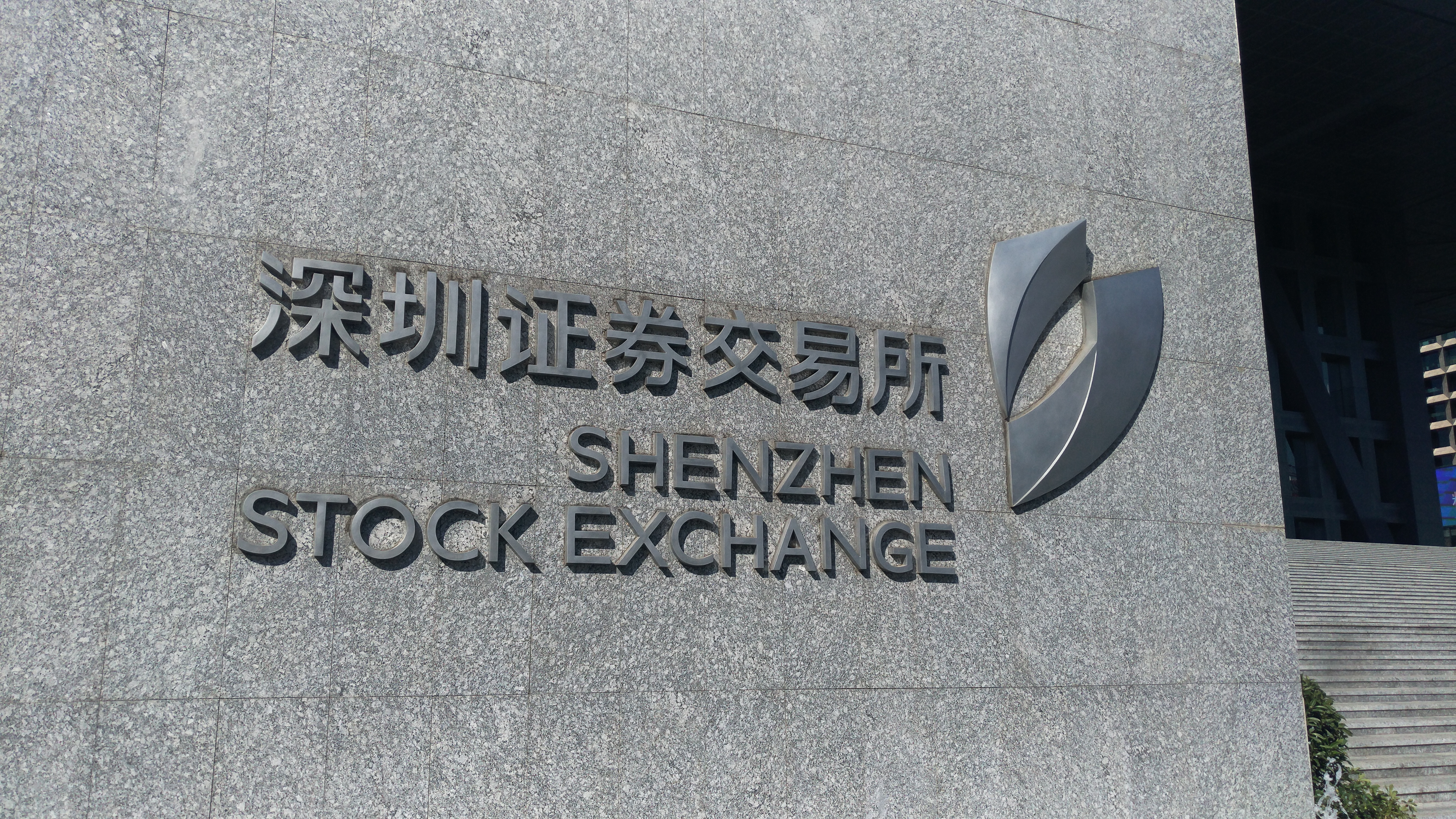 深圳证券交易所